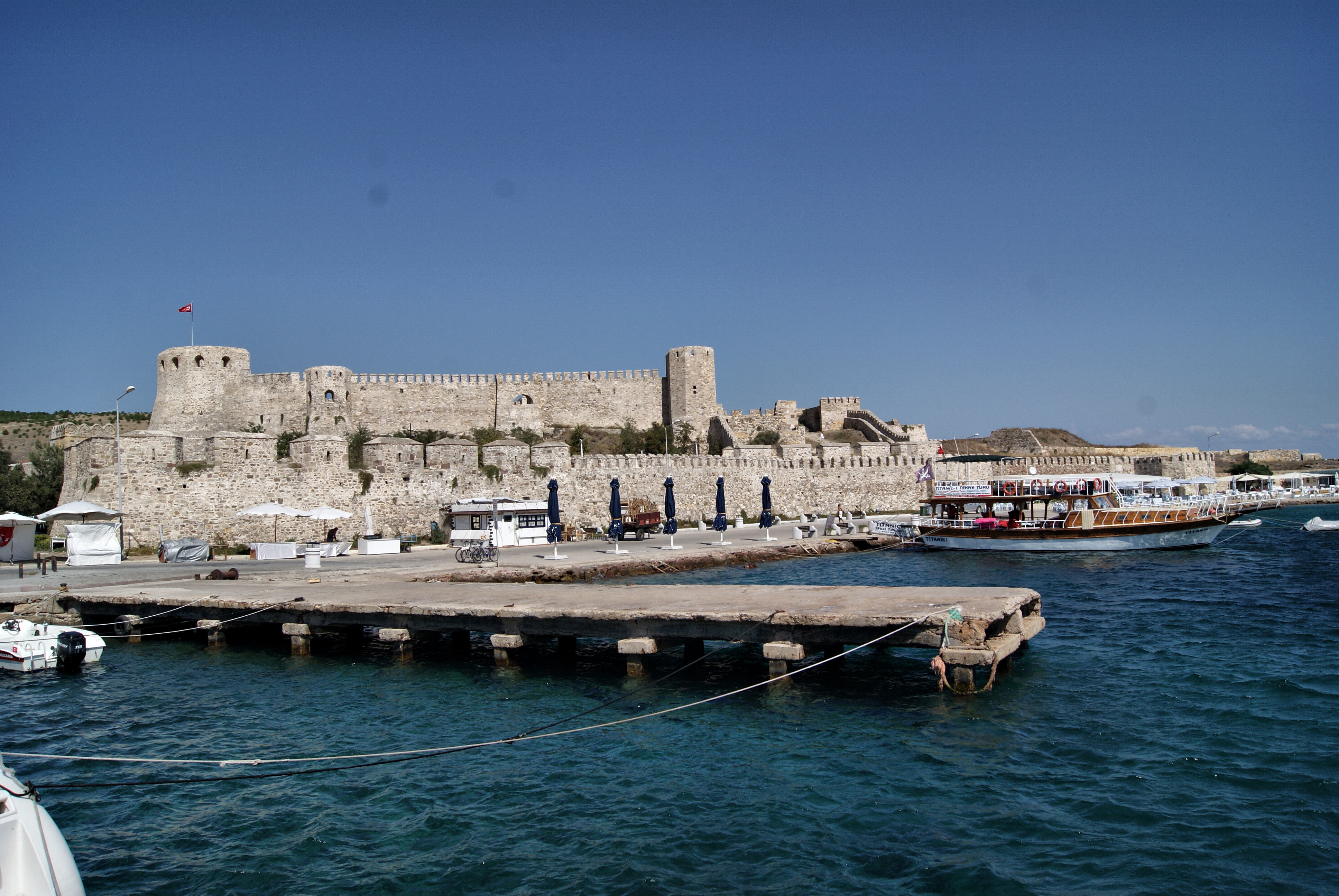 Bozcaada